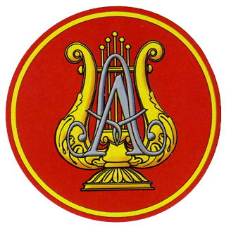 Нарукавная нашивка